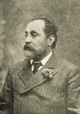 Retrat de Gaietà Buïgas i Monravà (1851-1919), arquitecte barceloní que va fer el monument a Colom a Barcelona. 1904 picture (unknown author)